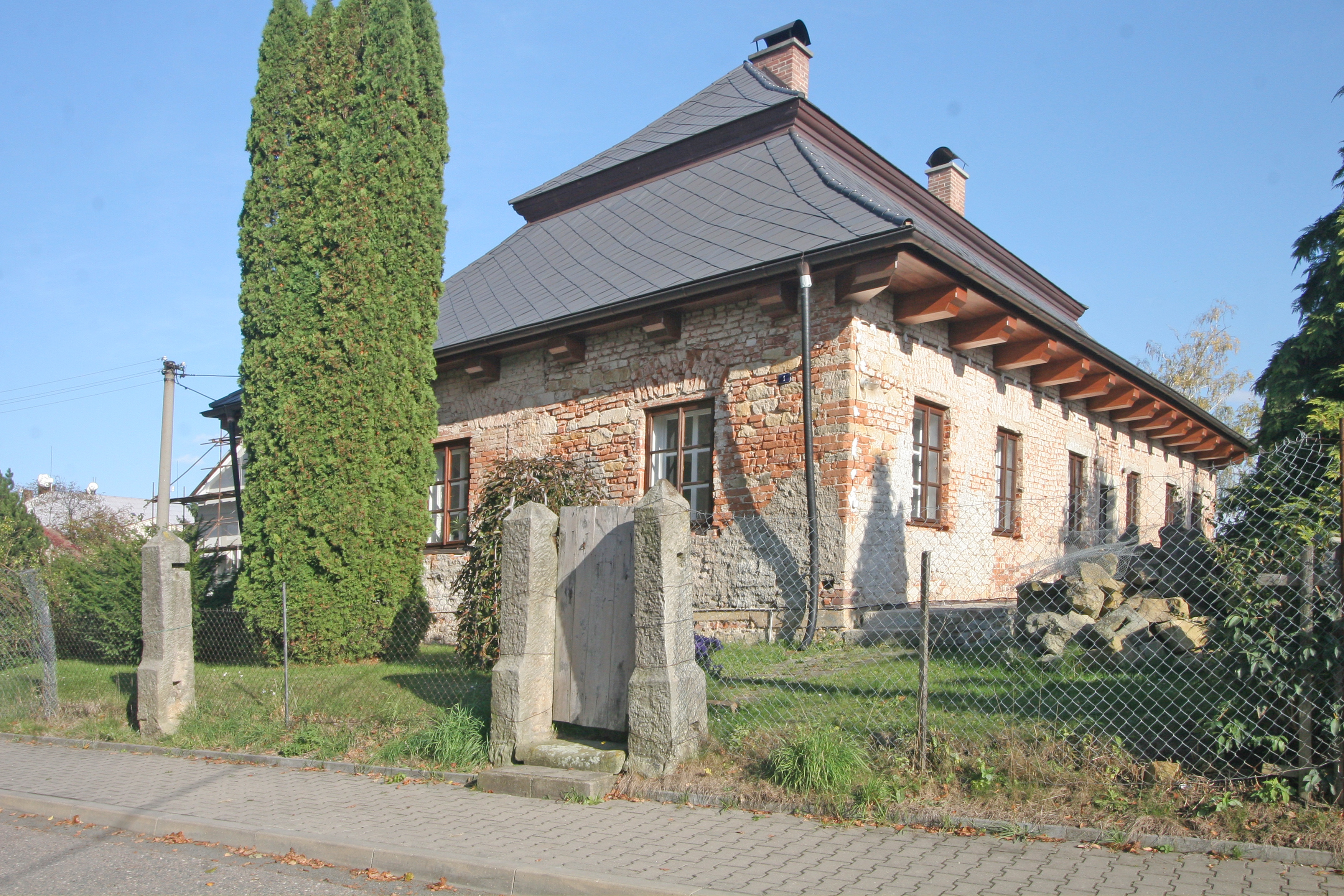 Fara (Probluz), Probluz 1